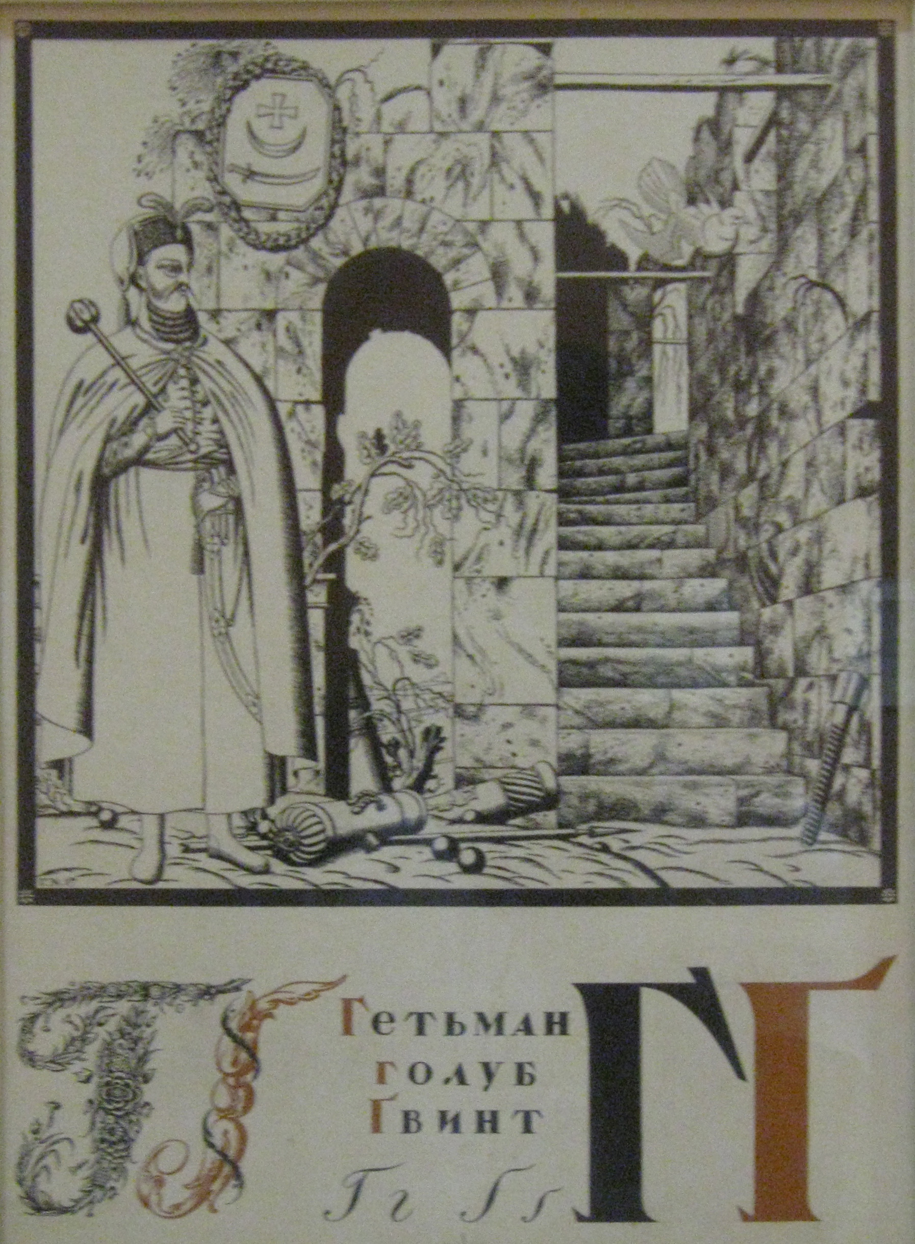 Георгій Нарбут. "Українська абетка. Літера "Г" (1917 р.) Виставка "Велике і Величне". Мистецький арсенал. 2013